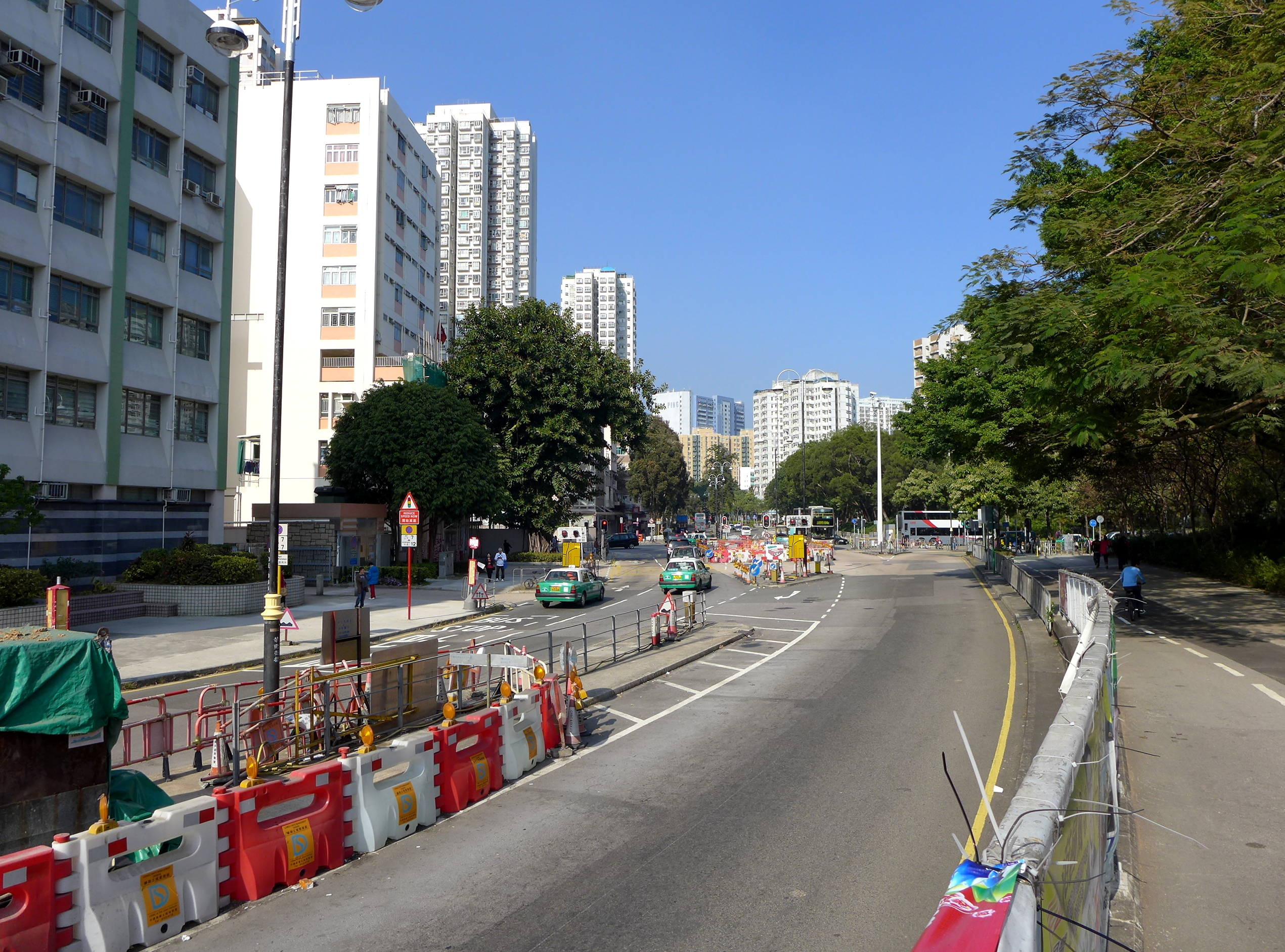 Ting Kok Road